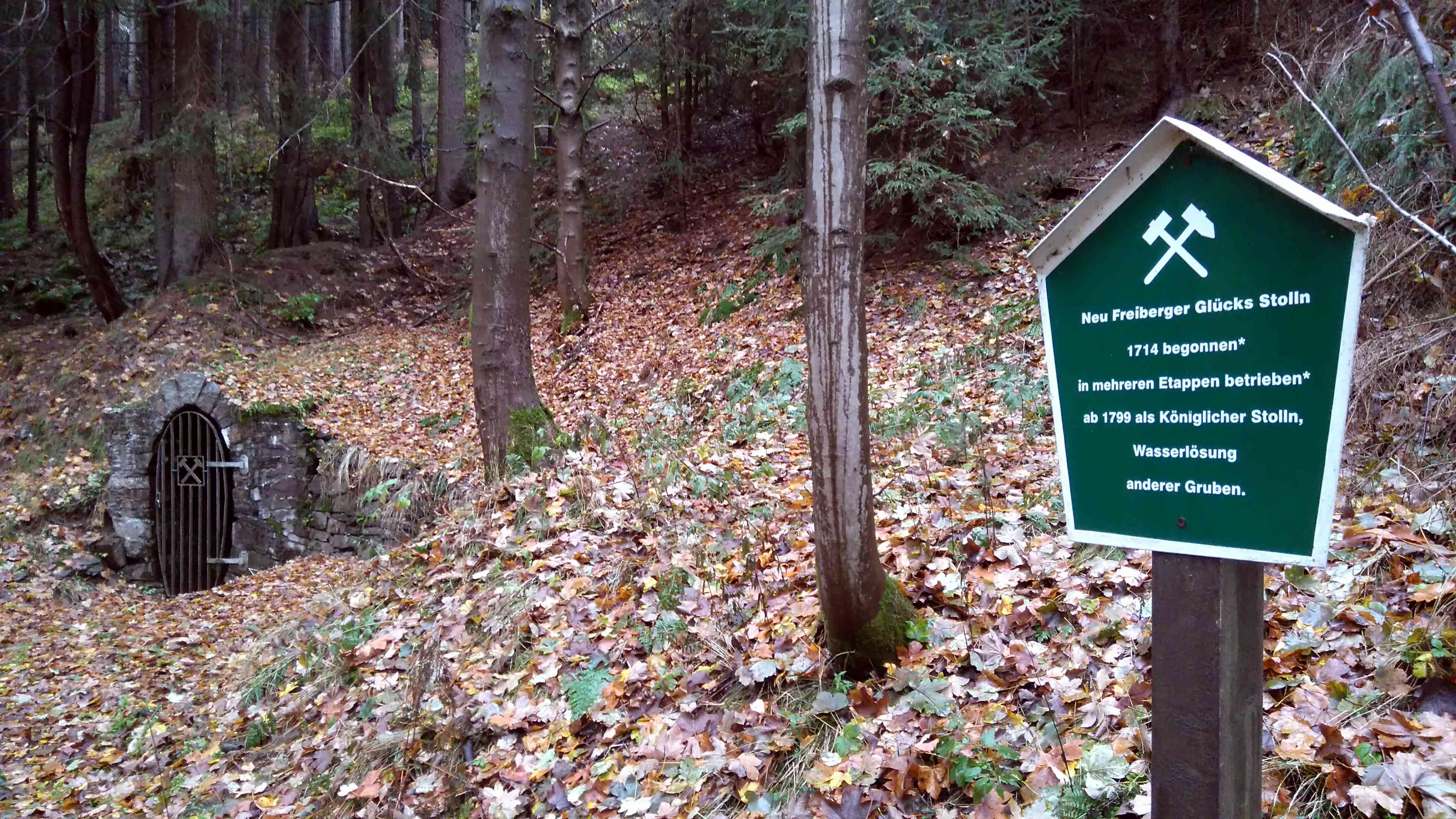 Neu Freiberger Glücks Stolln